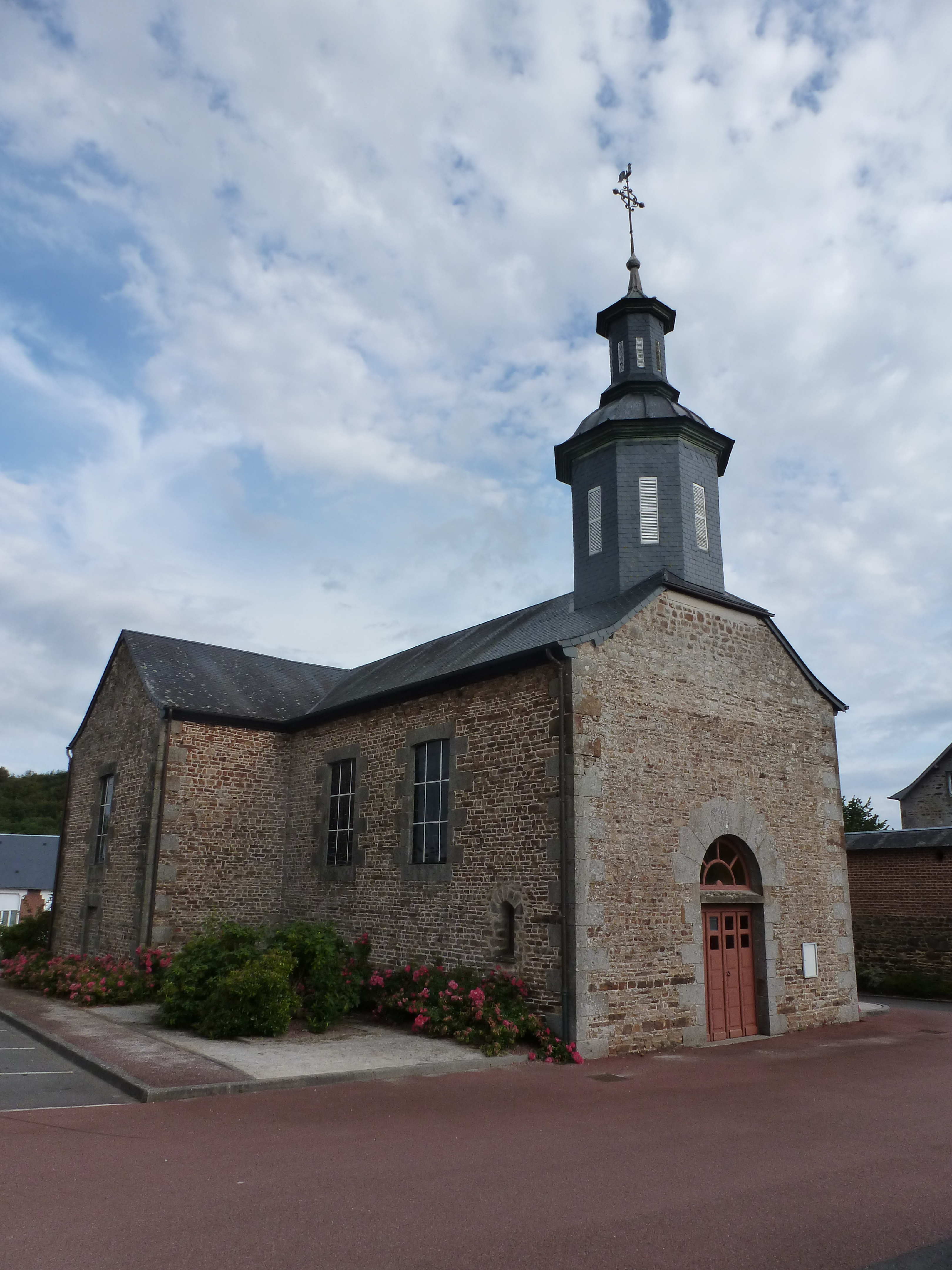 Eglise du Châtellier (Orne)